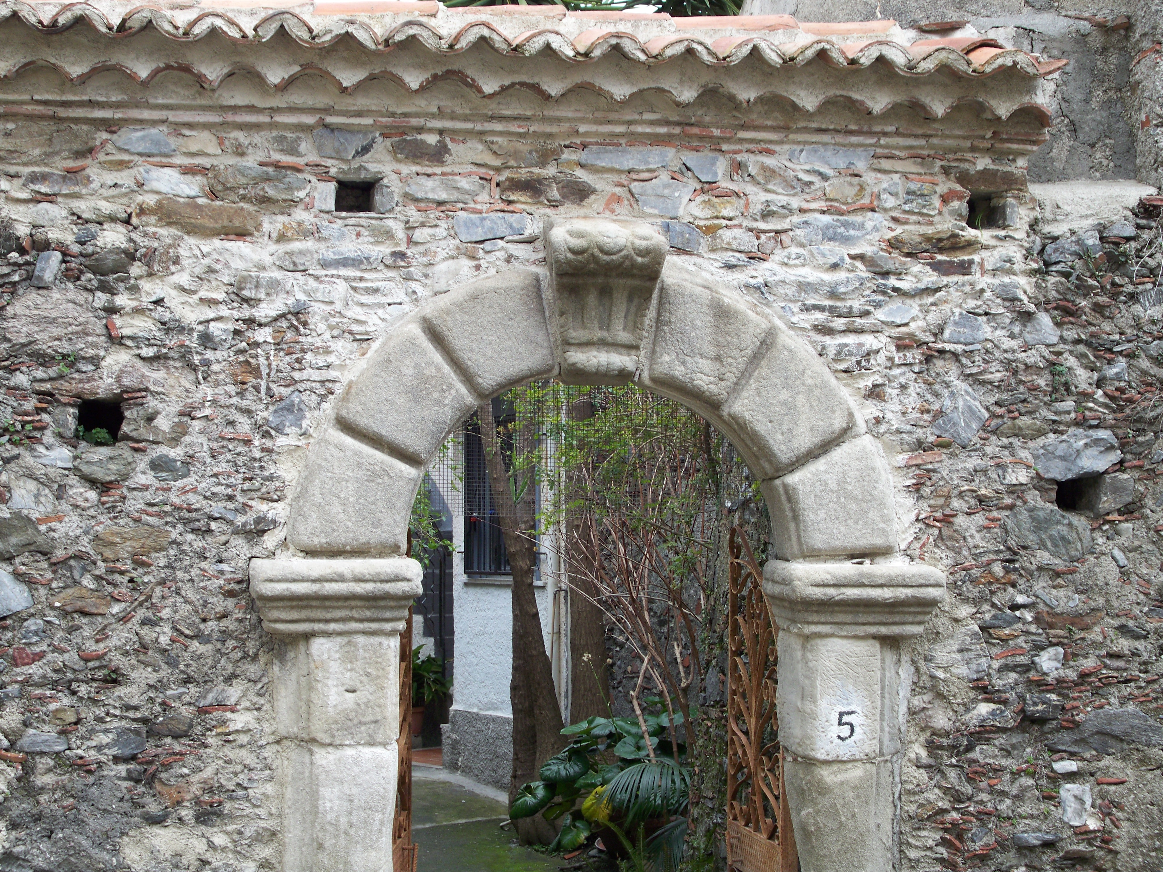 Antico portale, Casalvecchio Siculo